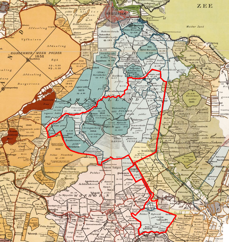 Approx. boundaries "De_Proosdijlanden"